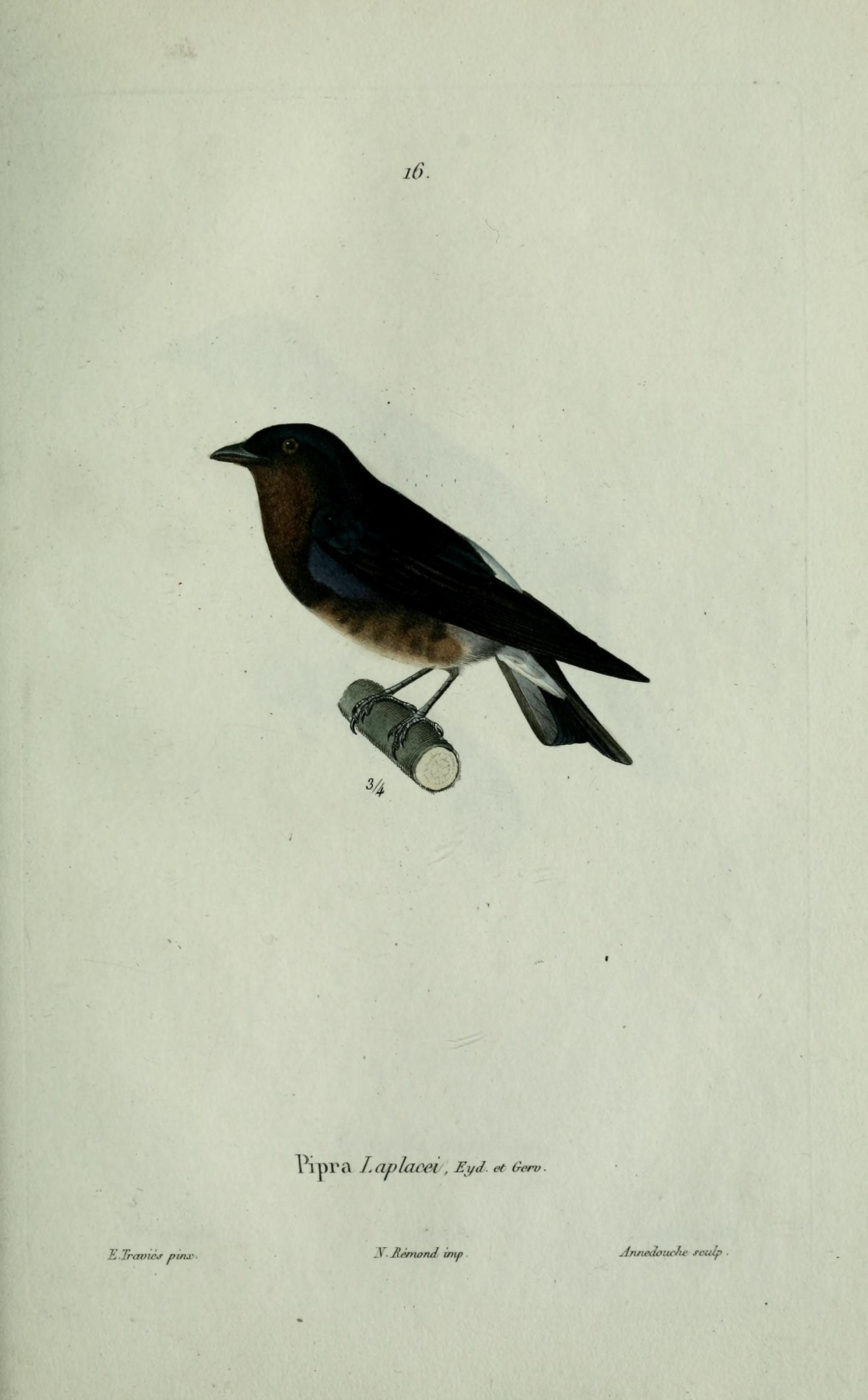 i6. Iodopleura fusca = Pipra Laplacei , Eid. et Gerv. EJrc X-JHéntonJ inip Anne^louchc sculp .